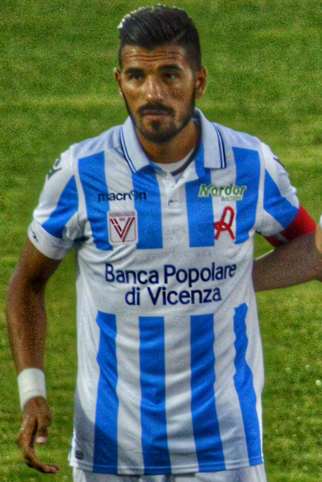 Formazione iniziale del Vicenza nel 1° Trofeo Morosini